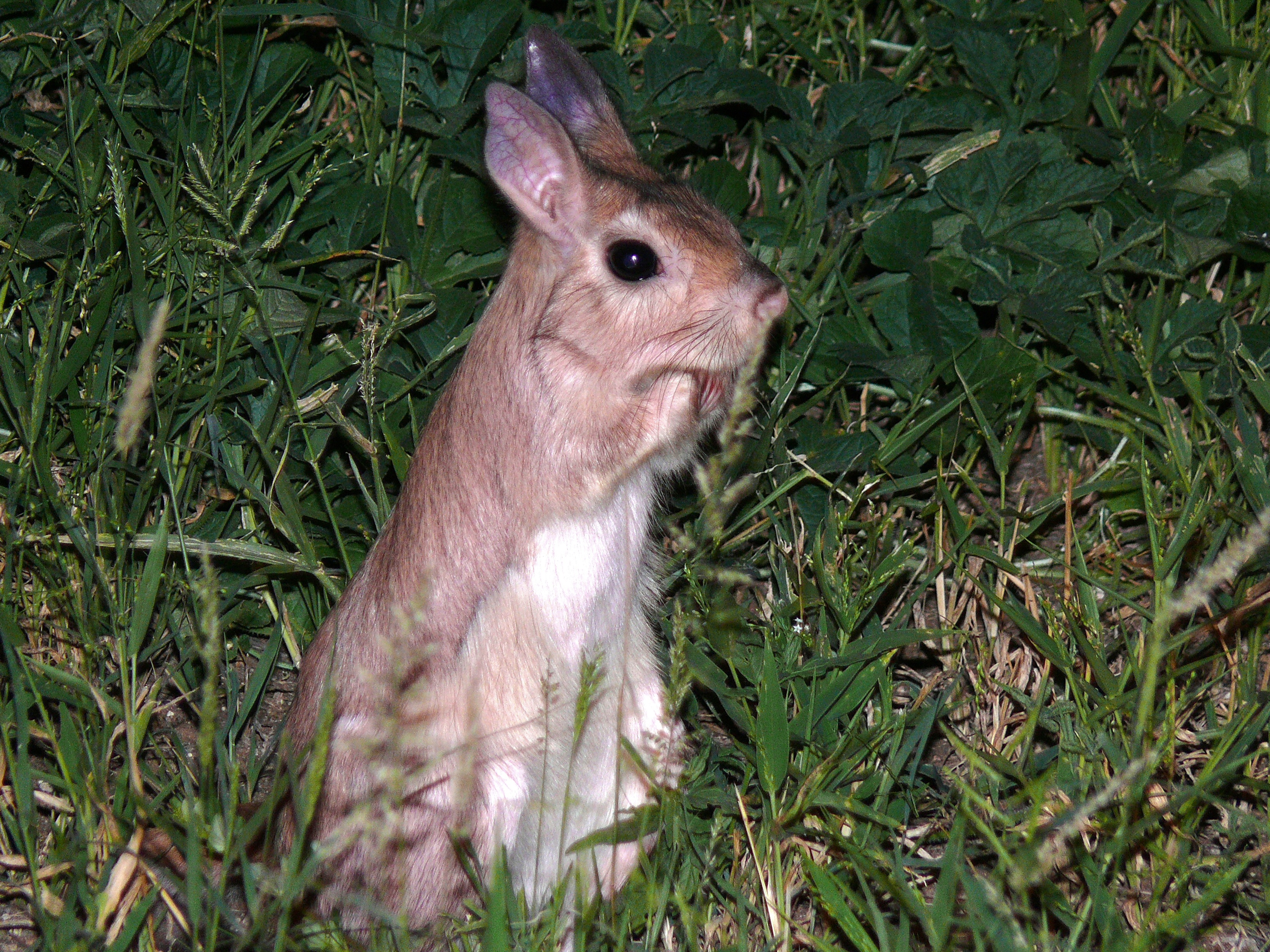 Letaba Night Drive, Kruger NP, SOUTH AFRICA